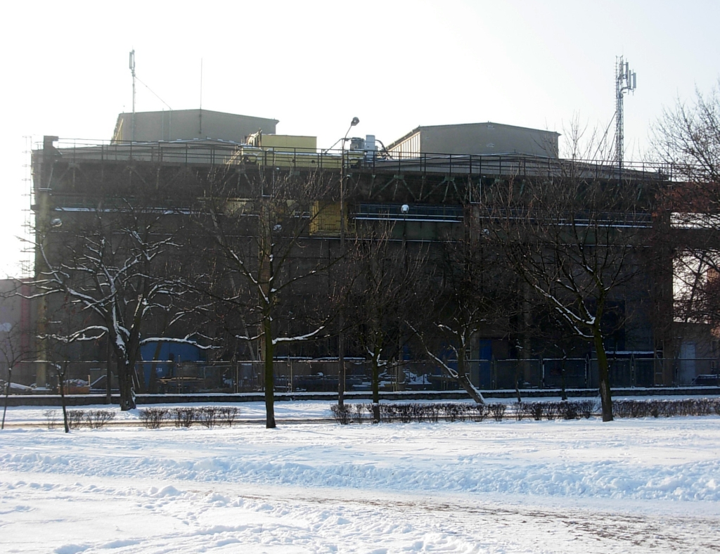 Makrum S.A. na osiedlu Leśnym w Bydgoszczy